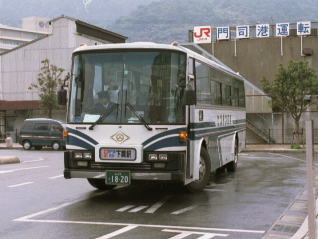 門司港駅バス停にて撮影